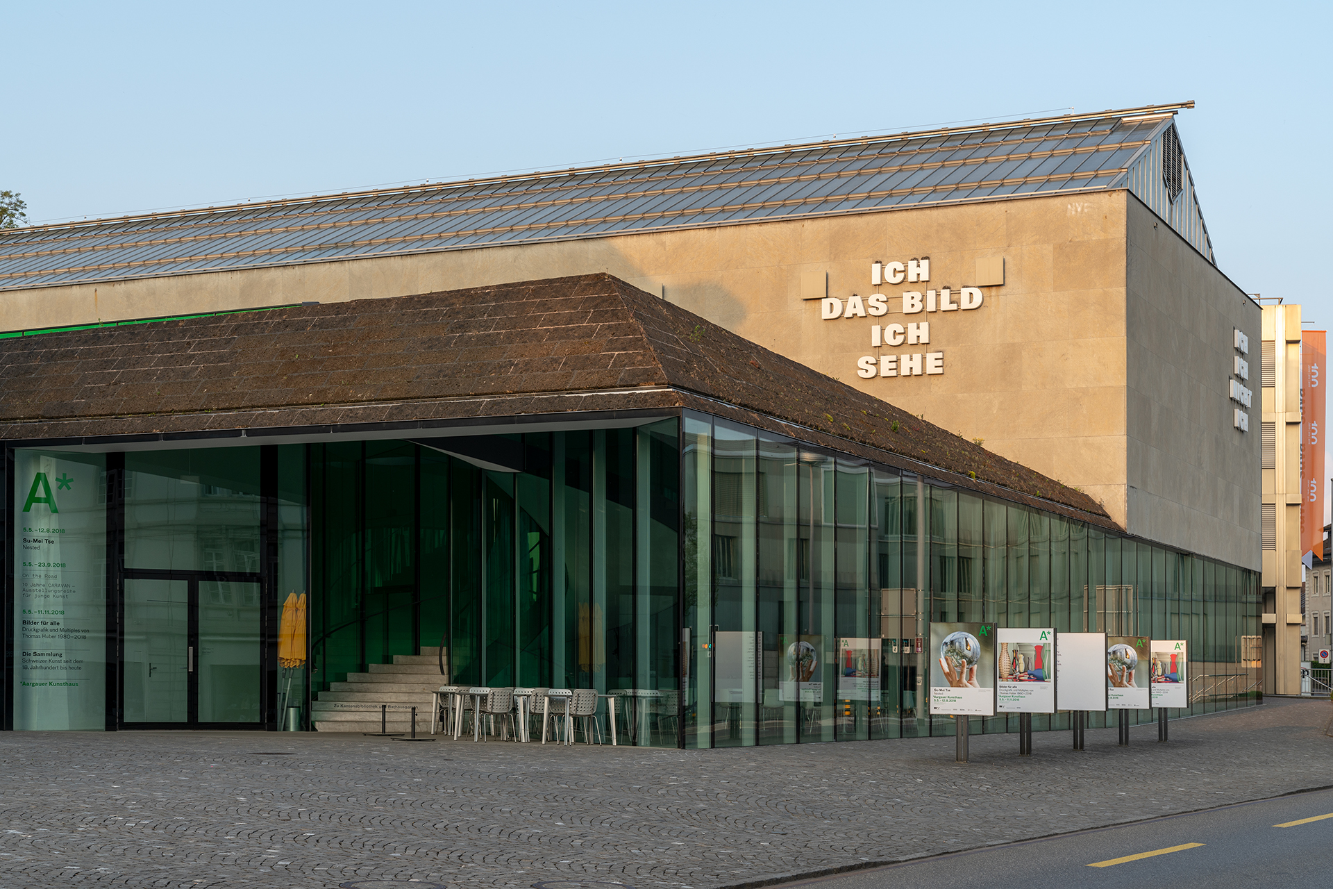 Kunsthaus in Aarau